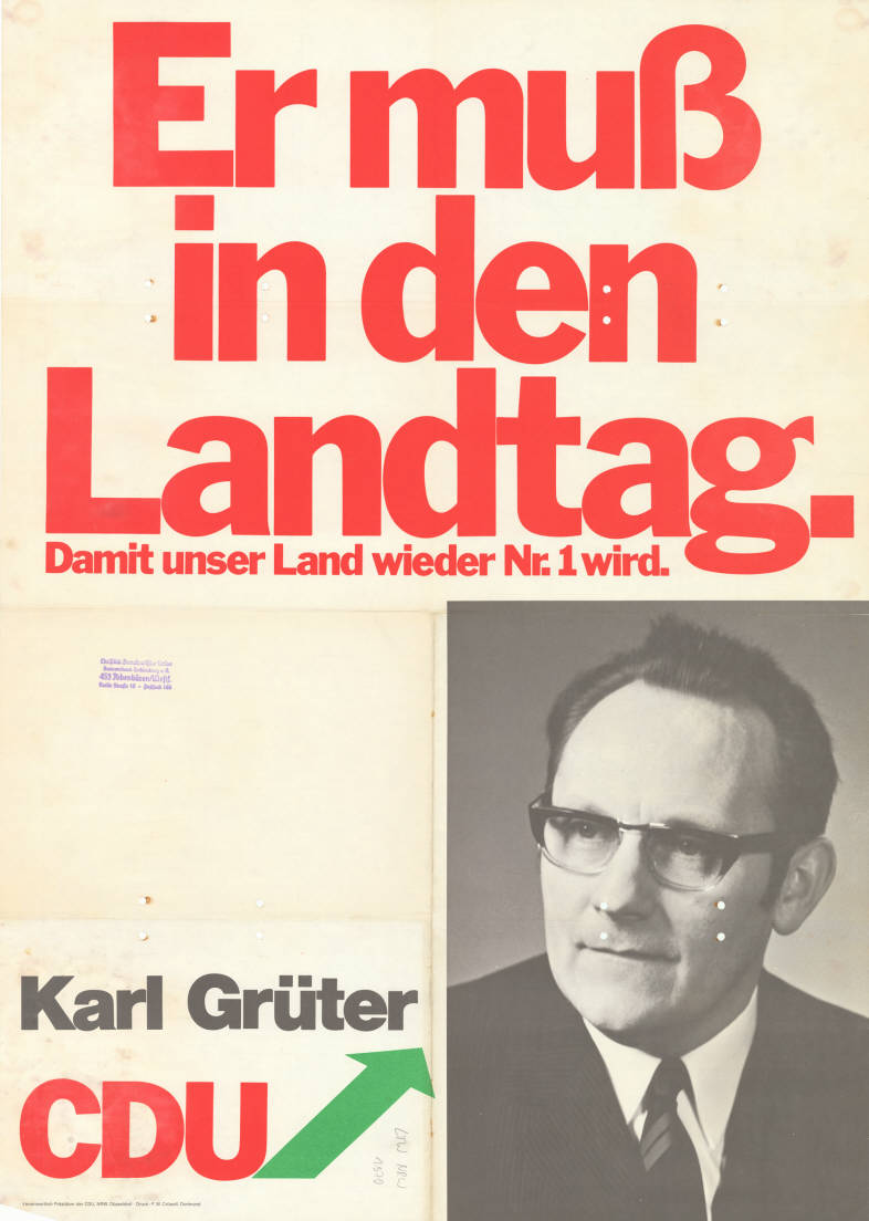 Er muß in den Landtag. Damit unser Land wieder Nr.1 wird. Karl Grüter CDU Abbildung: Porträtfoto Kommentar: Adressstempel des KV Tecklenburg e.V. auf der Vorderseite. Plakatart: Kandidaten-/Personenplakat mit Porträt Auftraggeber: Verantw.: Präsidium der CDU, NRW, Düsseldorf Drucker_Druckart_Druckort: F.W. Crüwell, Dortmund Objekt-Signatur: 10-009 : 651 Bestand: Landtagswahlplakate Nordrhein-Westfalen (10-009) GliederungBestand10-18: Landtagswahlplakate Nordrhein-Westfalen (10-009) » CDU Lizenz: KAS/ACDP 10-009 : 651 CC-BY-SA 3.0 DE